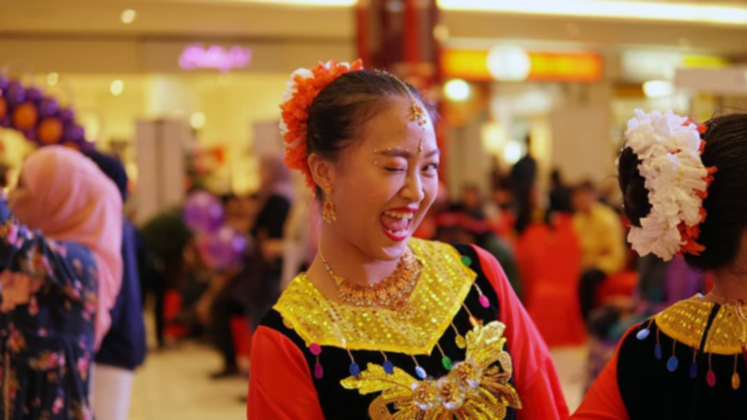 Gambar sepupu saya diambil awal tahun 1999.